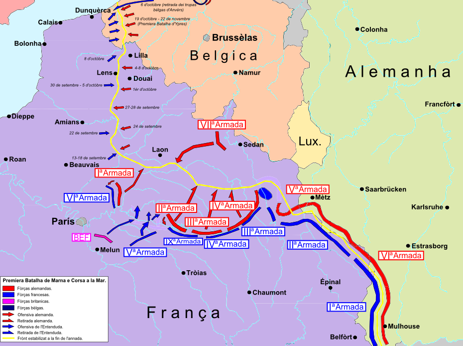 Premiera Batalha de Marna, Corsa a la Mar e estabilizacion dau frònt occidentau a la fin de 1914.